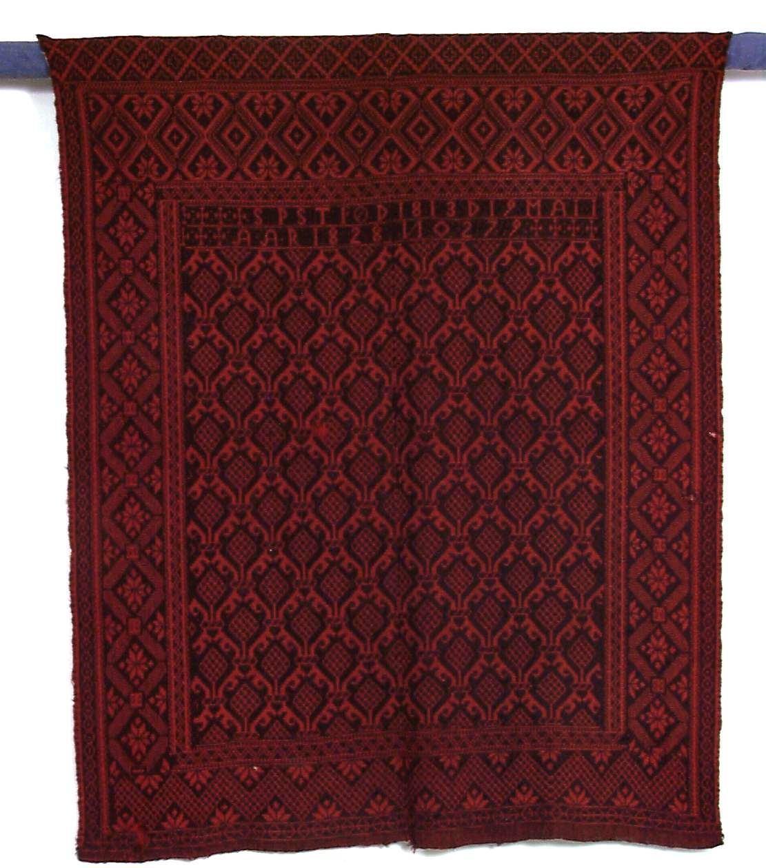 Åkle i dobbeltvev fra Tydal, Sør-Trøndelag, med vevd innskrift:"ST FØD 1813 D 19 MAI/ AAR 1828 NO 279". Vevd av Berit Hilmo. Foto Anne-Lise Reinsfelt, Norsk Folkemuseum, NF.1899-0226. "